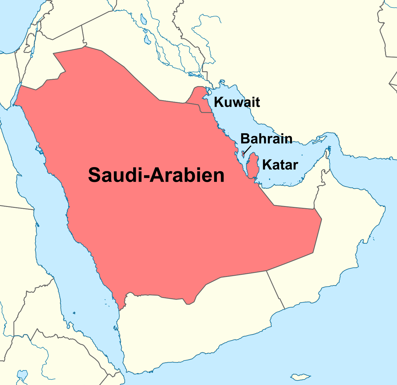 Apostolisches Vikariat Nördliches Arabien